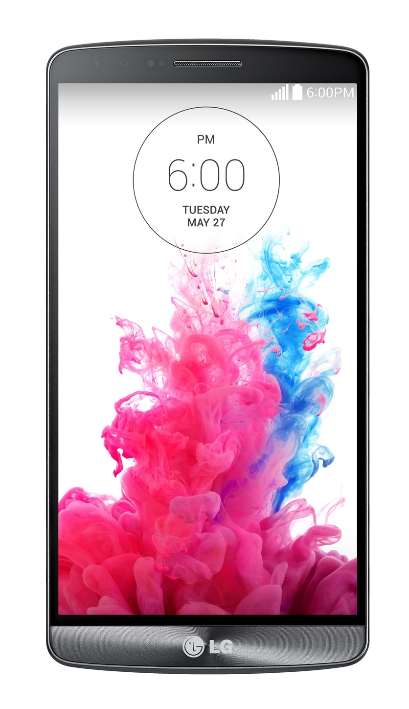 ■ 올 최대 전략 스마트폰 28일(한국시각 기준) 전 세계 동시 공개 □ 세계 6개 도시에서 24시간 이내 행사 완료 □ 28일 한국 출시 이어 세계 170여 통신사 순차 공급 예정 ■ ‘Simple is the New Smart’ 컨셉트 반영 □ 사용자 경험 최우선의 G시리즈 철학 계승 ■ 글로벌 런칭 첫 쿼드HD 스마트폰 □ 쿼드HD(2,560x1,440) IPS 디스플레이 탑재 □ 538ppi 초고해상도 구현… HD의 4배, 풀HD의 2배 ■ 레이저 오토 포커스로 빠르게 초점 잡는 카메라 □ 후면에서 레이저 빔 쏘아 피사체와의 거리를 초고속으로 측정 □ 어두운 곳에서도 선명하게 찍히는 전면 카메라 □ 오디오까지 배려한 비디오 레코딩 ■ 심플함을 담은 입체 디자인 □ 매끈한 일체감 느껴지는 전면 디자인에 심플한 GUI 적용 □ 후면엔 인체공학적 곡률 채택해 한 손에 들어오는 그립감 구현 □ 메탈릭 스킨 후면 커버, 더 편해진 후면키 채택 ■ 사용자를 이해하는 진정한 스마트 UX □ 빅데이터 분석해 오타 줄여주는 ‘스마트 키보드’ □ 사용 패턴 기억해 맞춤형 정보 제공하는 ‘스마트 알림이’ □ 노크 코드, 컨텐츠 잠금, 킬스위치로 강화된 ‘스마트 시큐리티’ ※ Social LG전자 에서 관련 보도자료를 확인하실 수 있습니다.